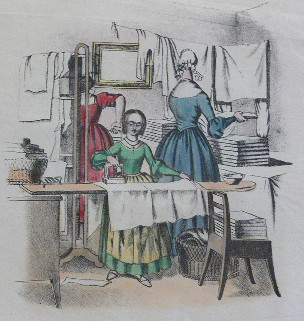 Bügeln, aus einer Serie von handkolorierten Kreidelithographien mit weiblichen Tätigkeiten, 2. Viertel 19. Jh. Landesmuseum Württemberg (Außenstelle Museum für Volkskultur in Württemberg, Waldenbuch) 1.18, Inv. Nr. 1984/74